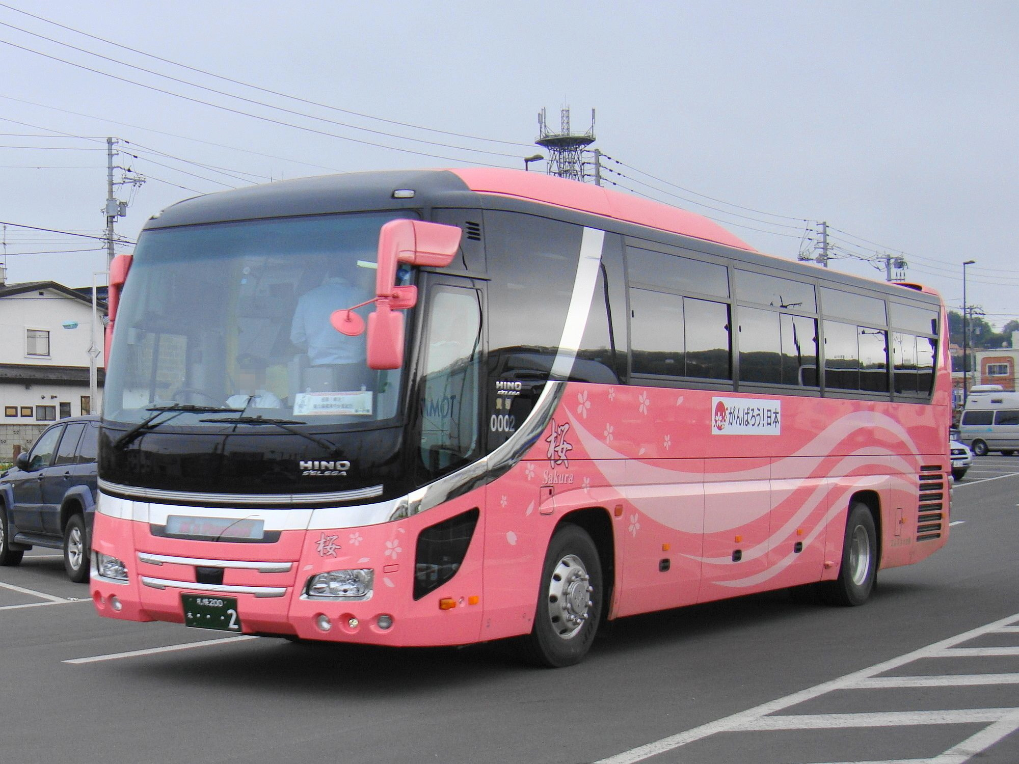 駿亜旅遊除去、桜追加